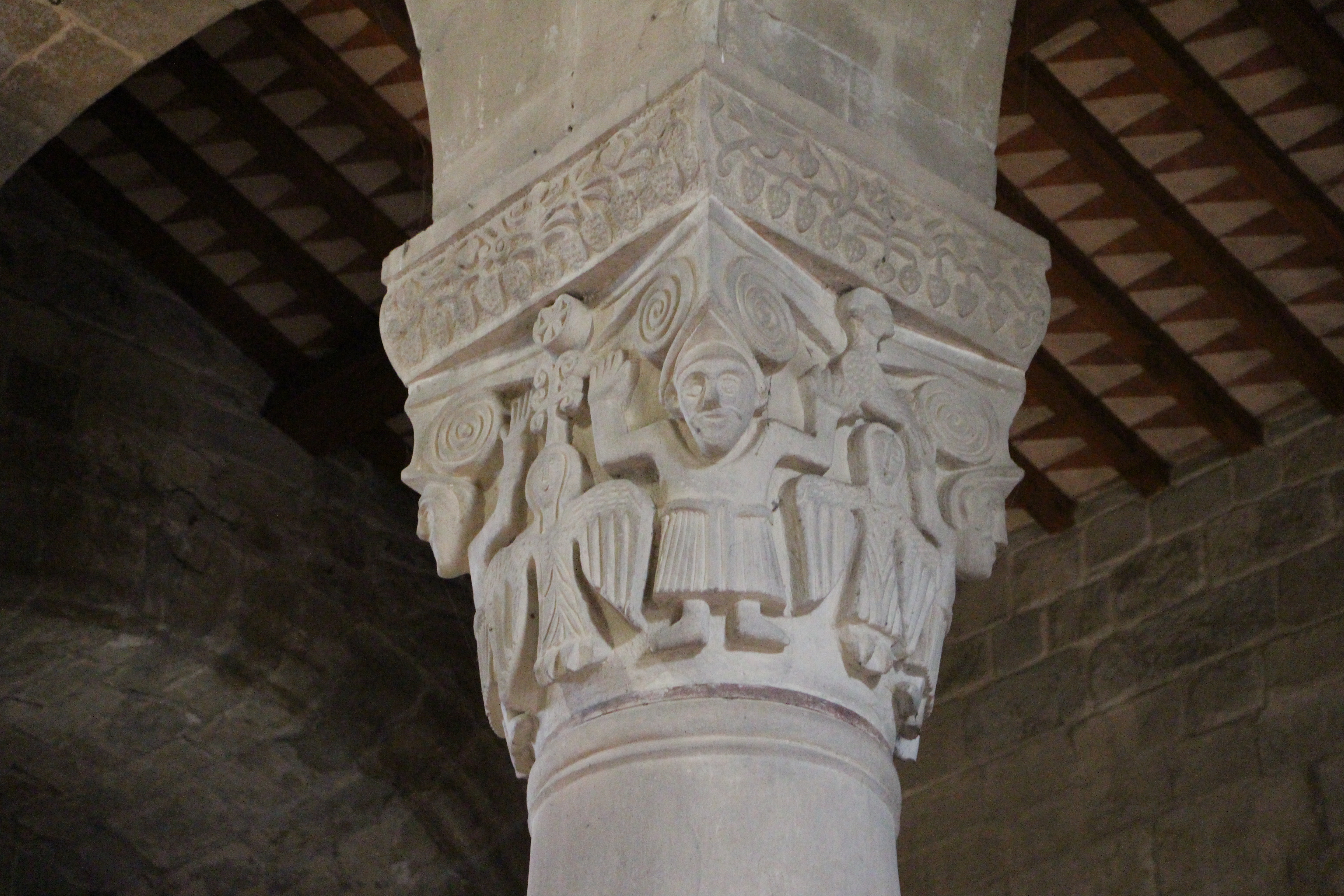 Pieve di Romena